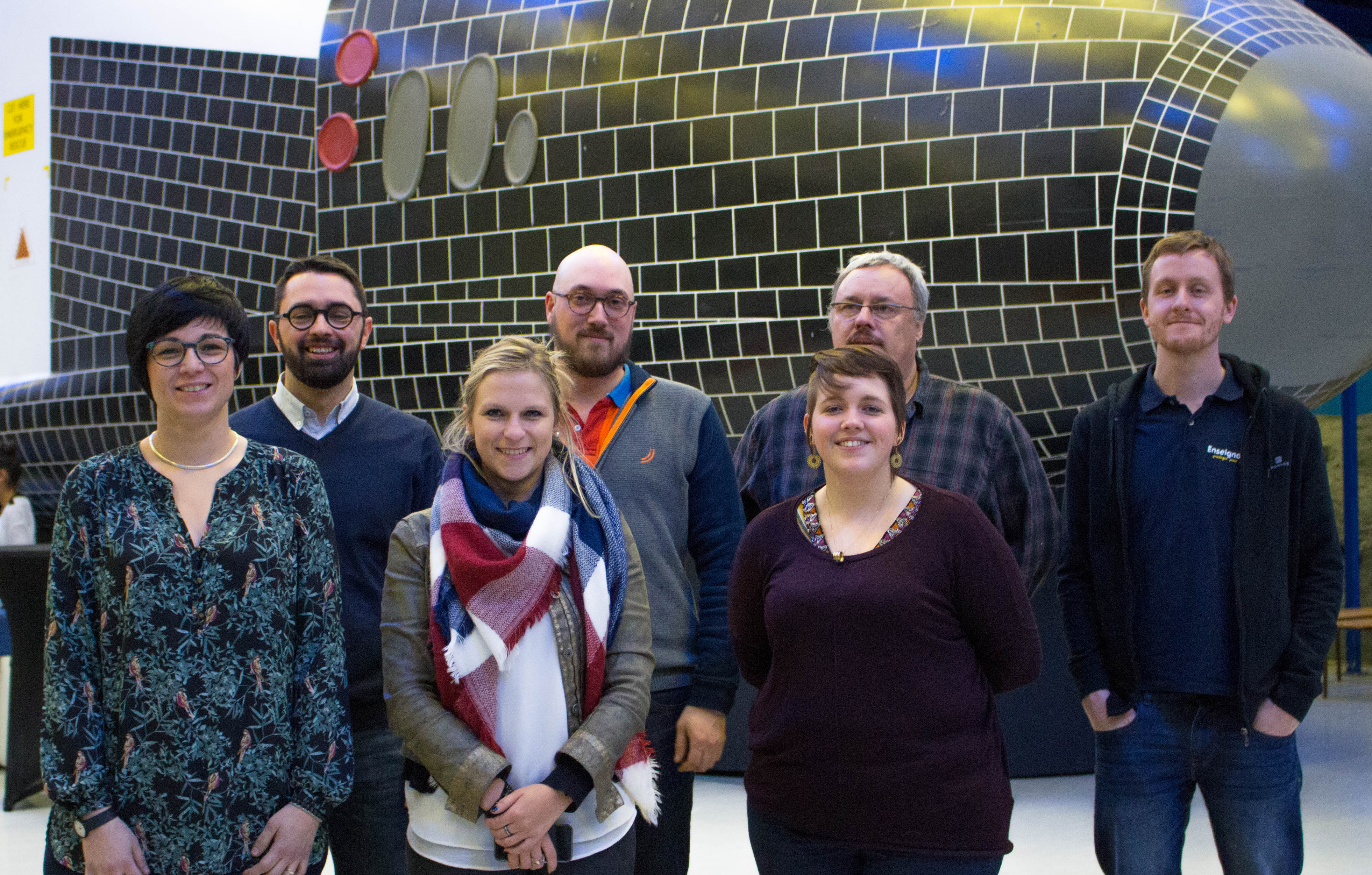 De gauche à droite : Mélanie Goussot, Laurent Merenne, Aurélie Monhonvalle, Jonathan Fischbach, Caroline Vanerwegen, Philippe Dujardin, Bérenger Buchet.